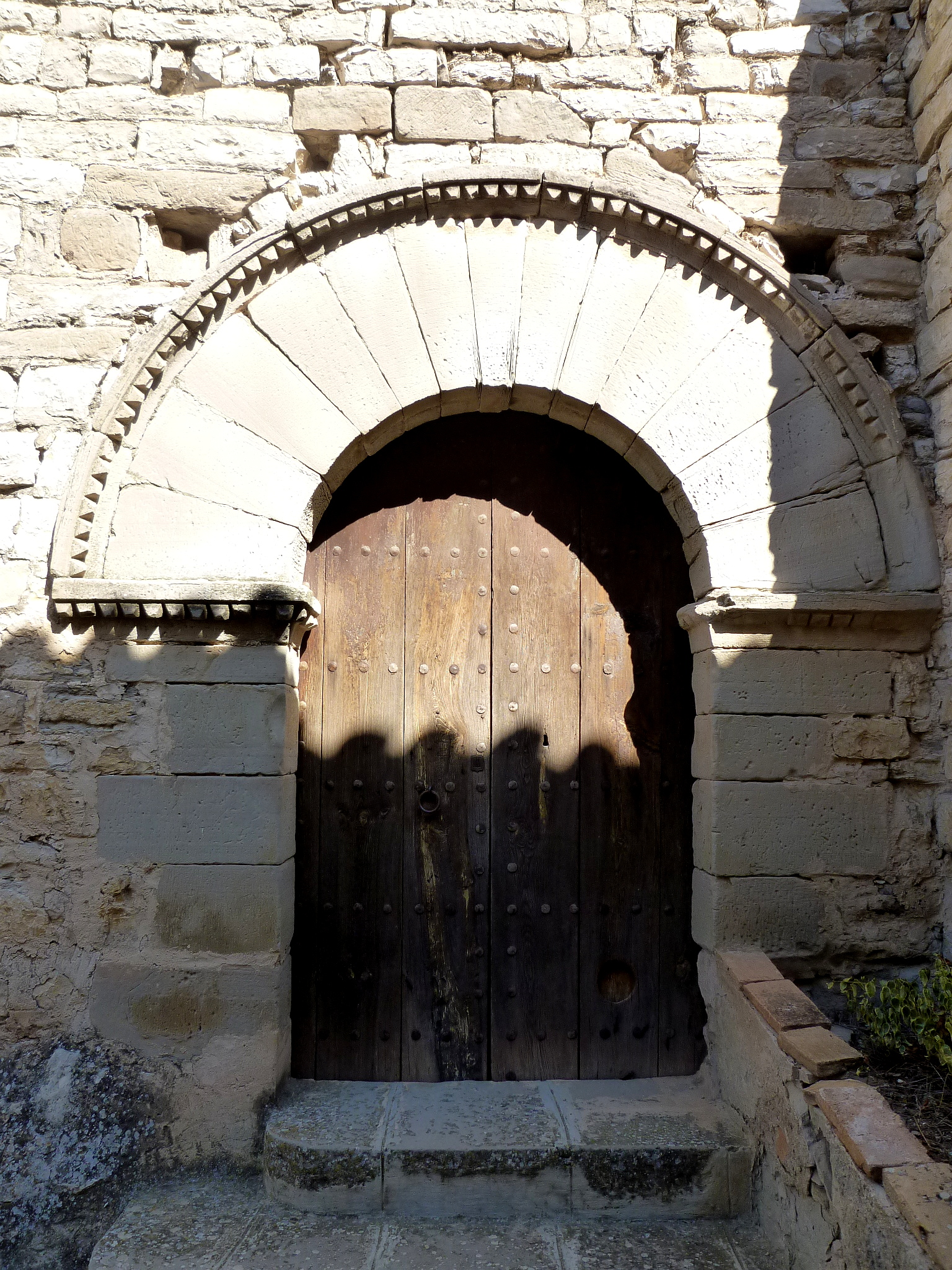 Església parroquial de Sant Martí (Sant Ramon): Portal